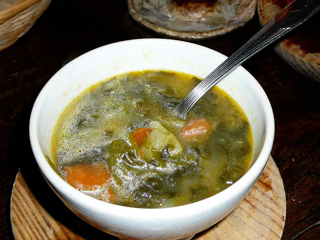 Caldo galego, Galiza